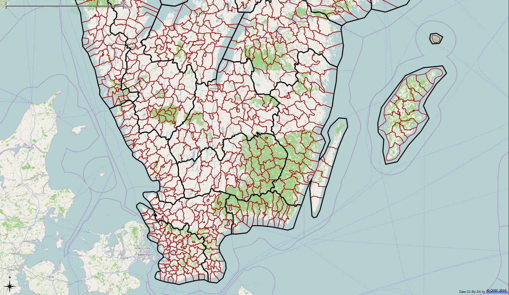 Sydsveriges kommuner enligt Scb:s folkräkning 1960.